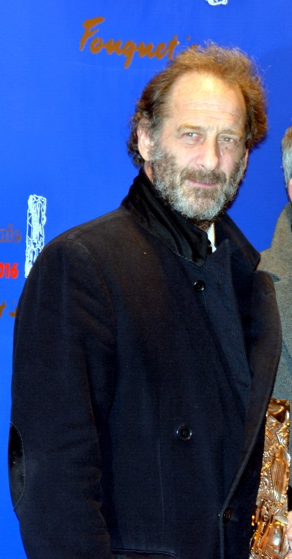 Vincent Lindon à la cérémonie des César